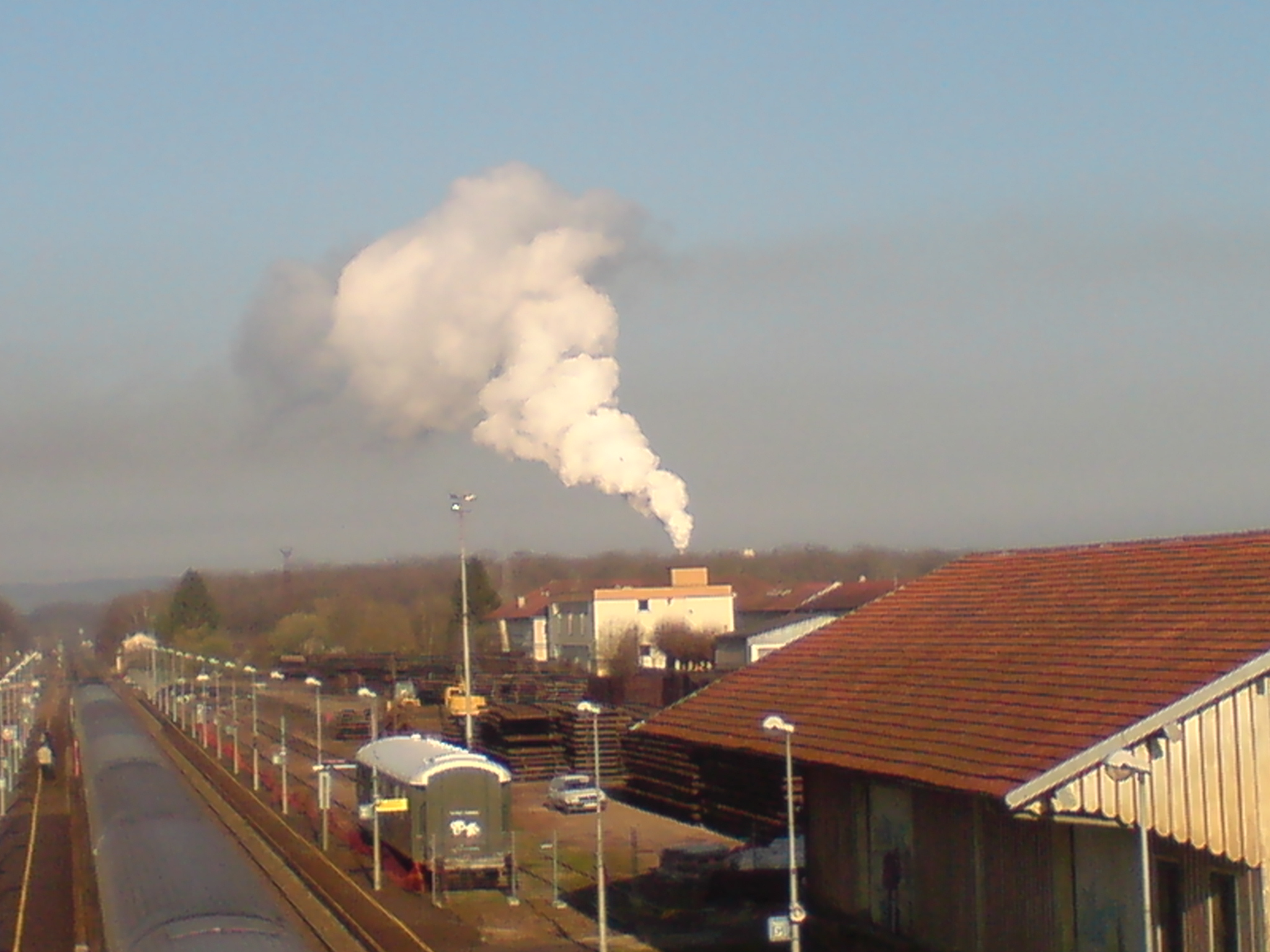 Swedspan, une usine produisant des panneaux de particules, il ne s'échappe que de la vapeur d'eau non nocive quoique parfois malodorante.